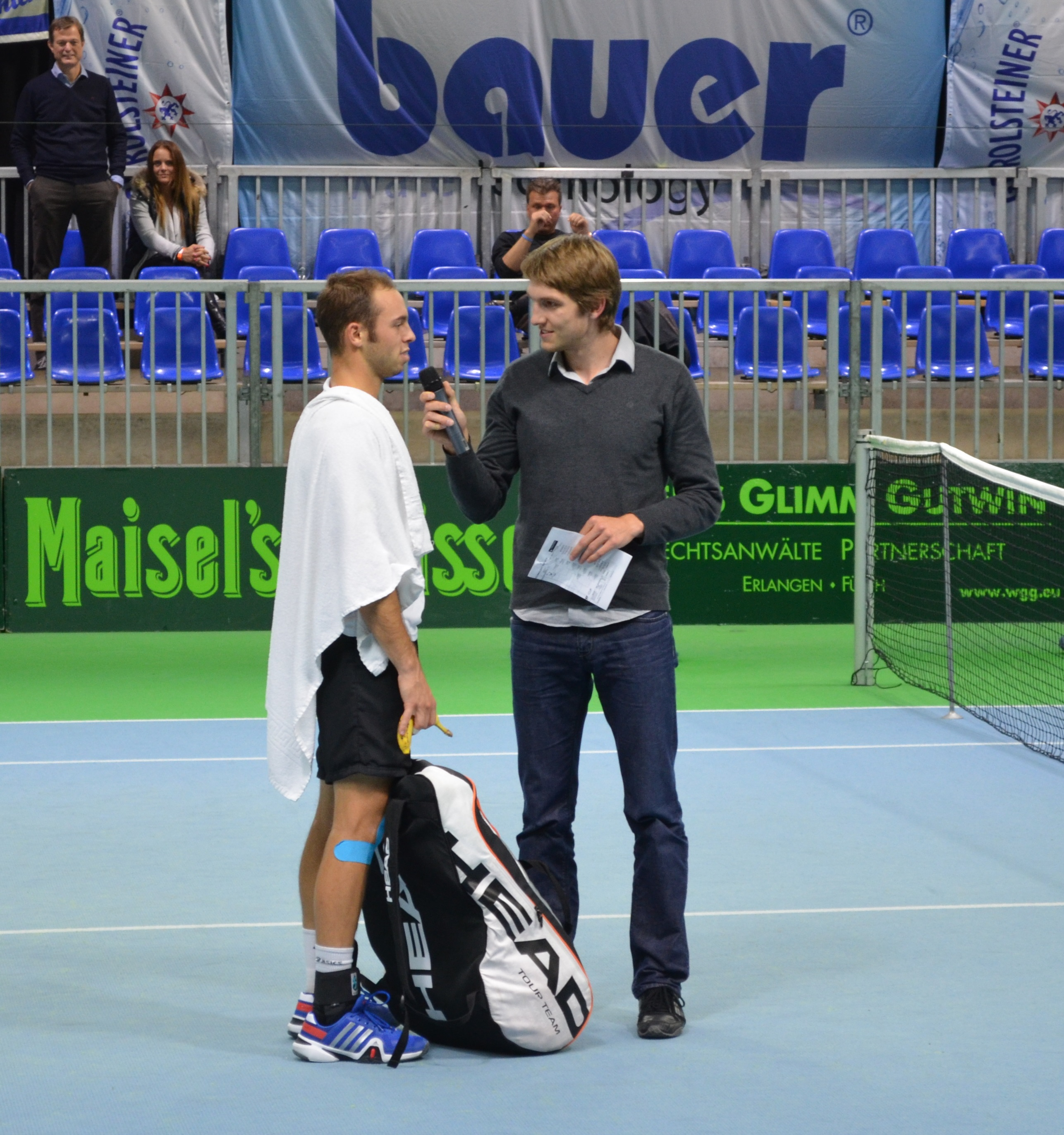 Tim Pütz nach seinem Sieg über Matthias Bachinger beim bauer watertechnology cup 2014 in Eckental